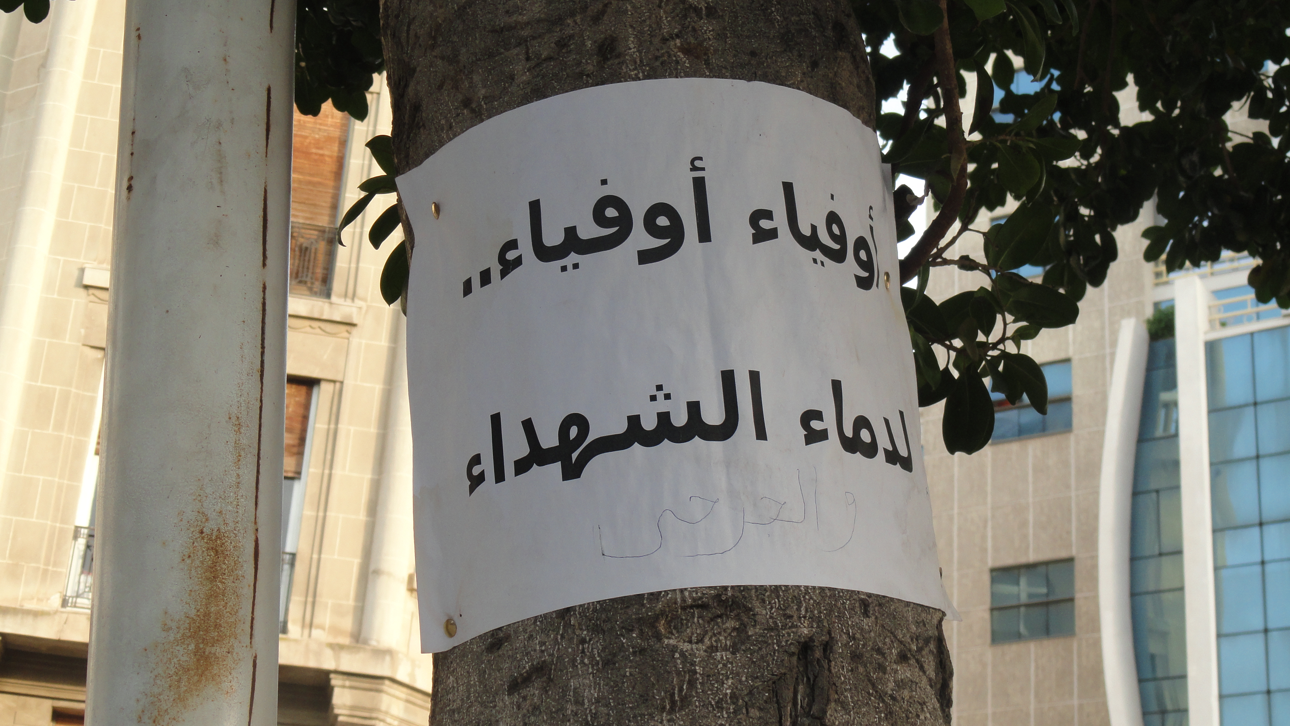 لوحة معلقة على شجرة في شارع الحبيب بورقيبة.Unknown